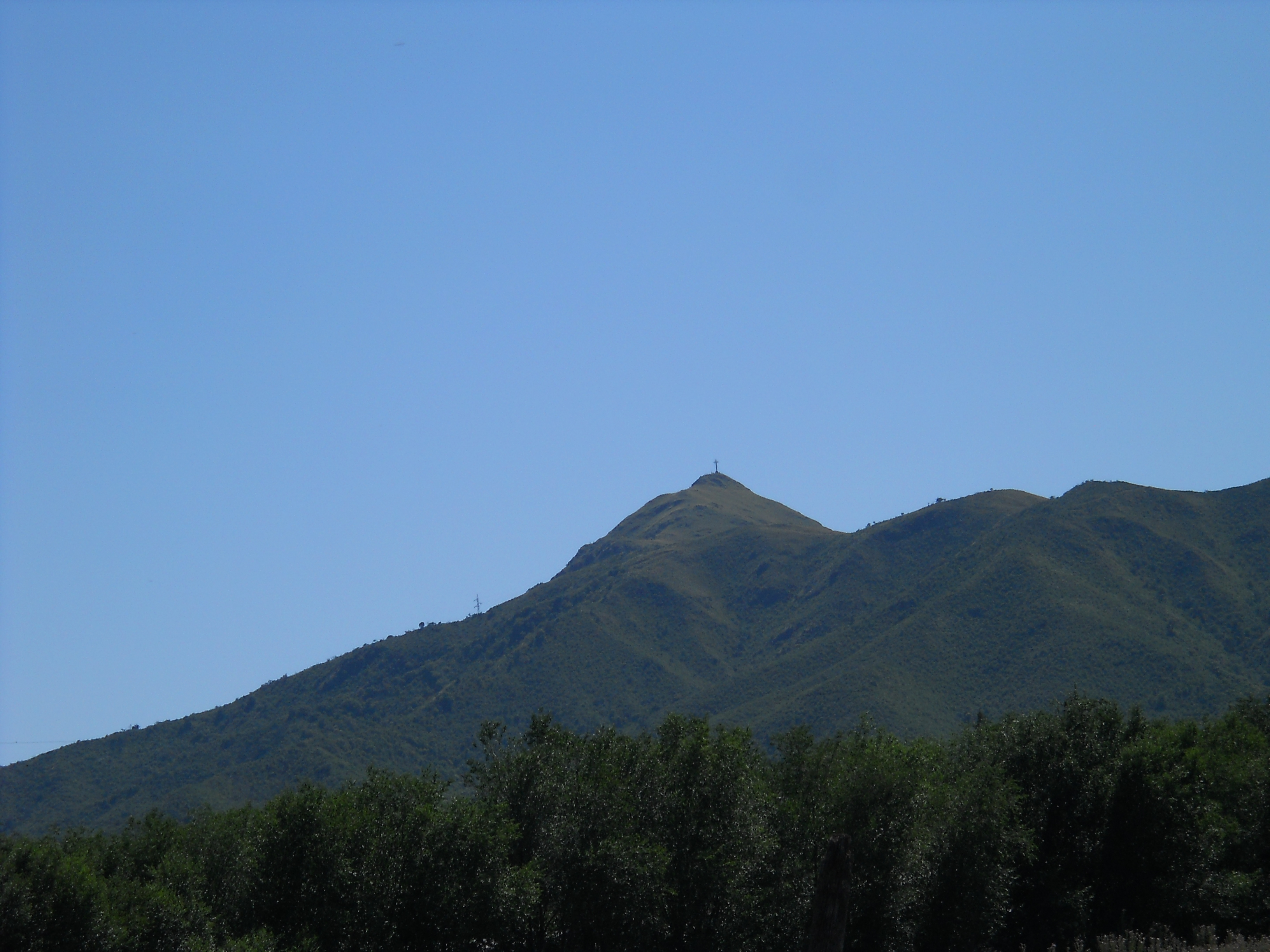 Vista del Cerro Pan de Azúcar, desde el ingreso a la ciudad de Cosquín